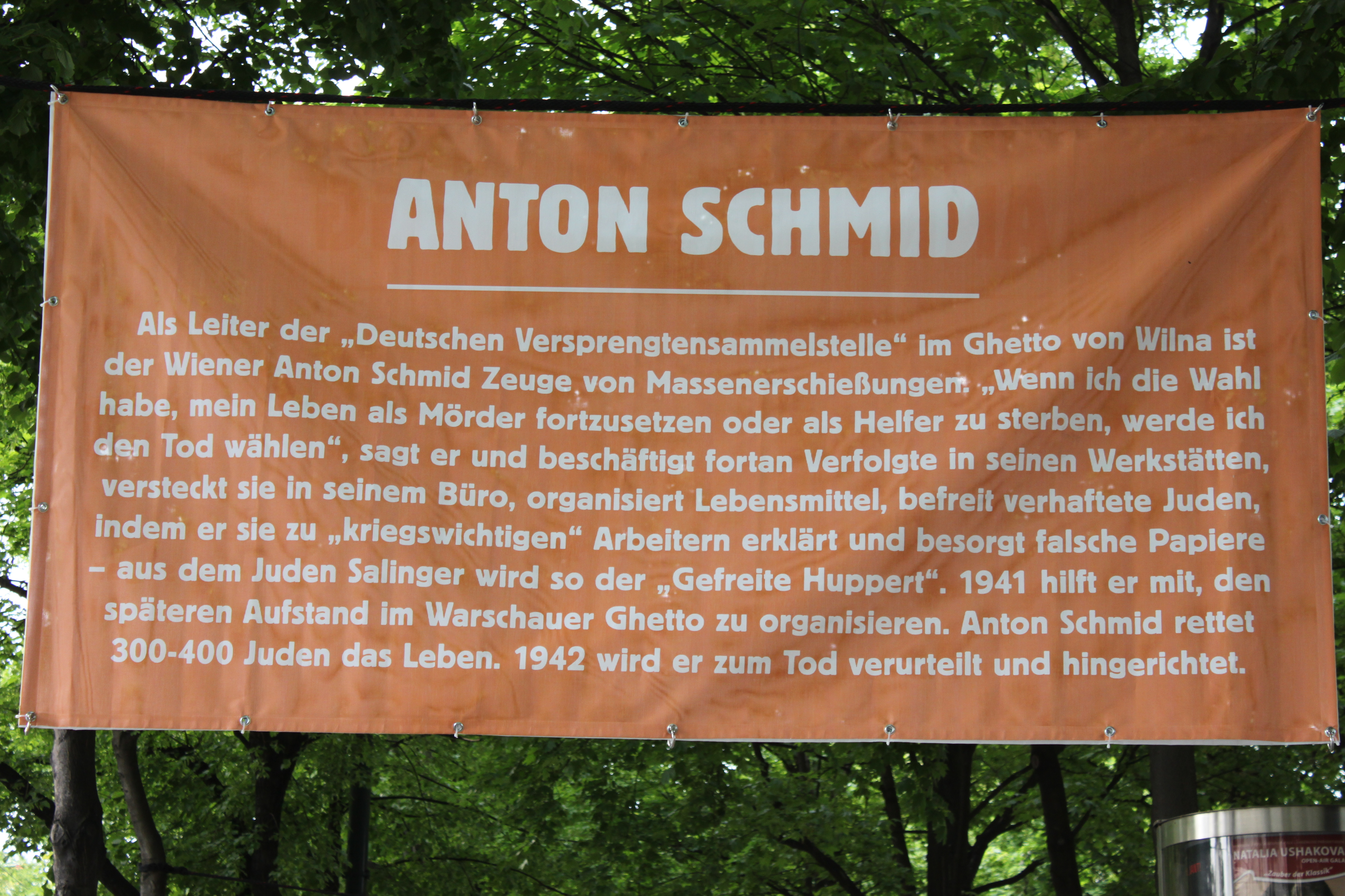 Anton Schmid (Unteroffizier)